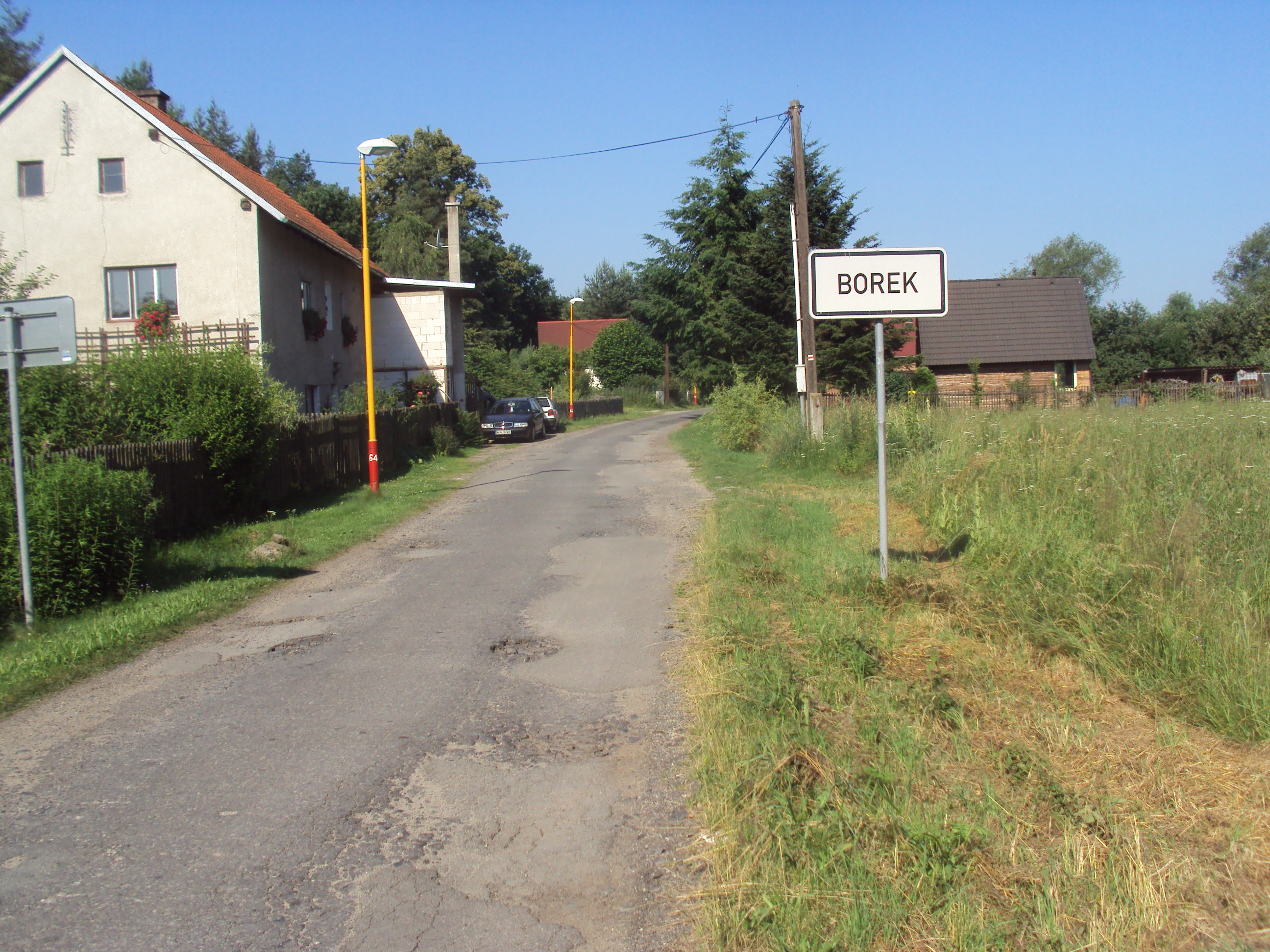 Začátek obce